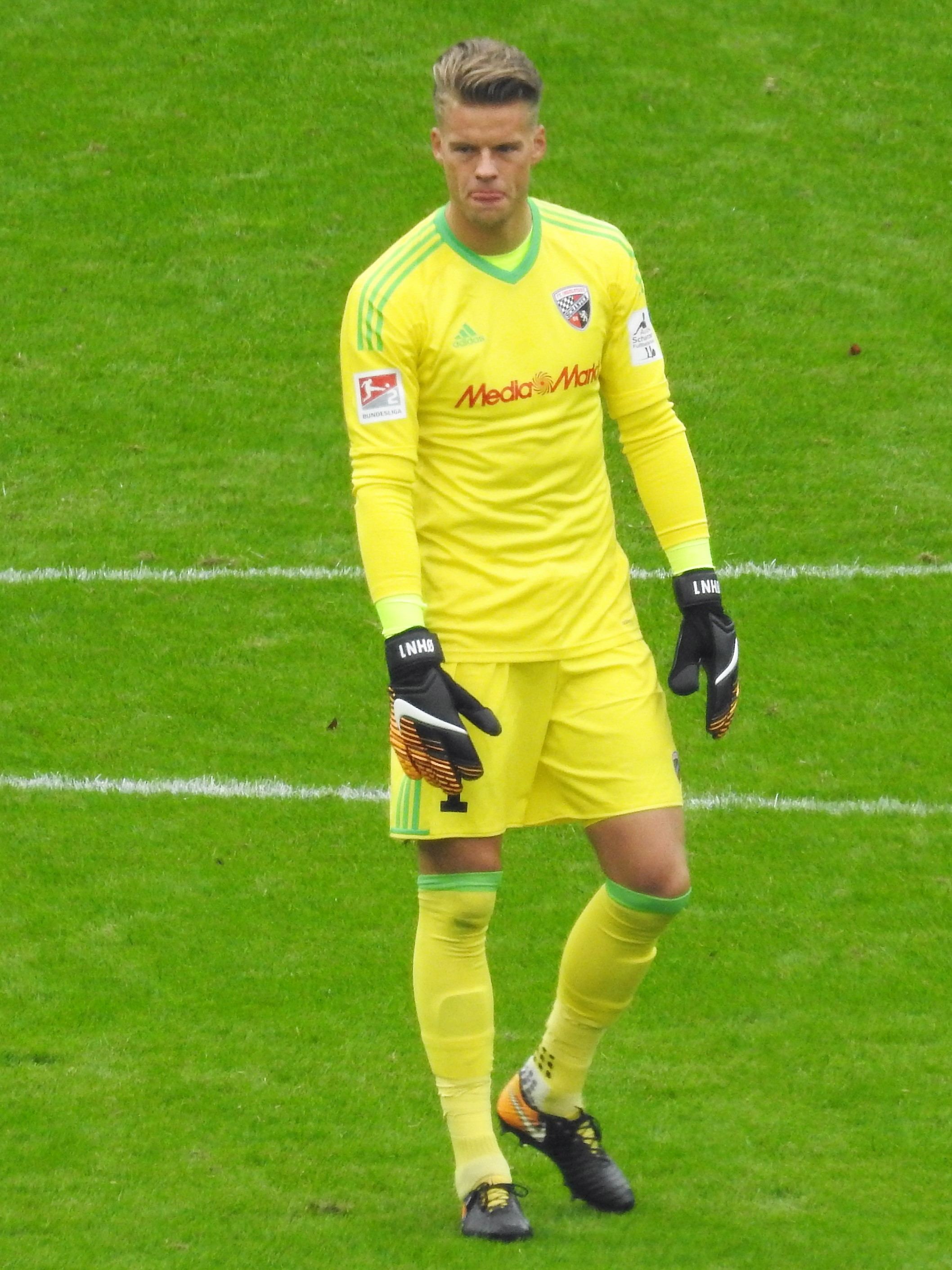 Nyland, Ørjan Ingolstadt